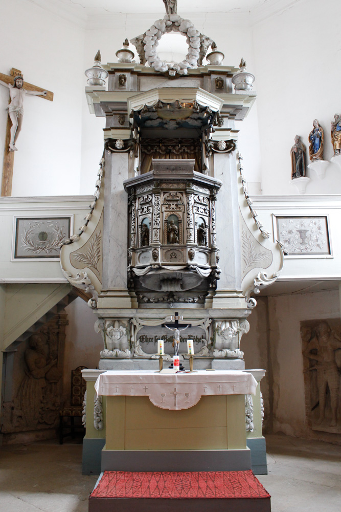 Kirche in Kayna, Zeitz, Burgenlandkreis, Sachsen-Anhalt, Deutschland